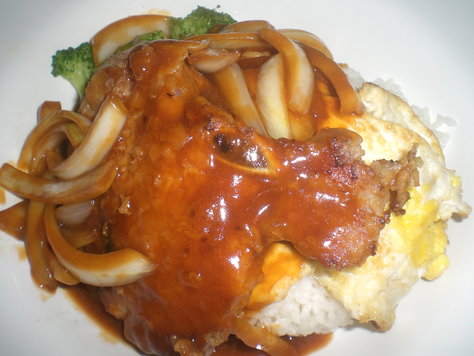 香港大學內的zh:食肆 - 由美心食品經營的Food2 碟頭飯豬扒飯